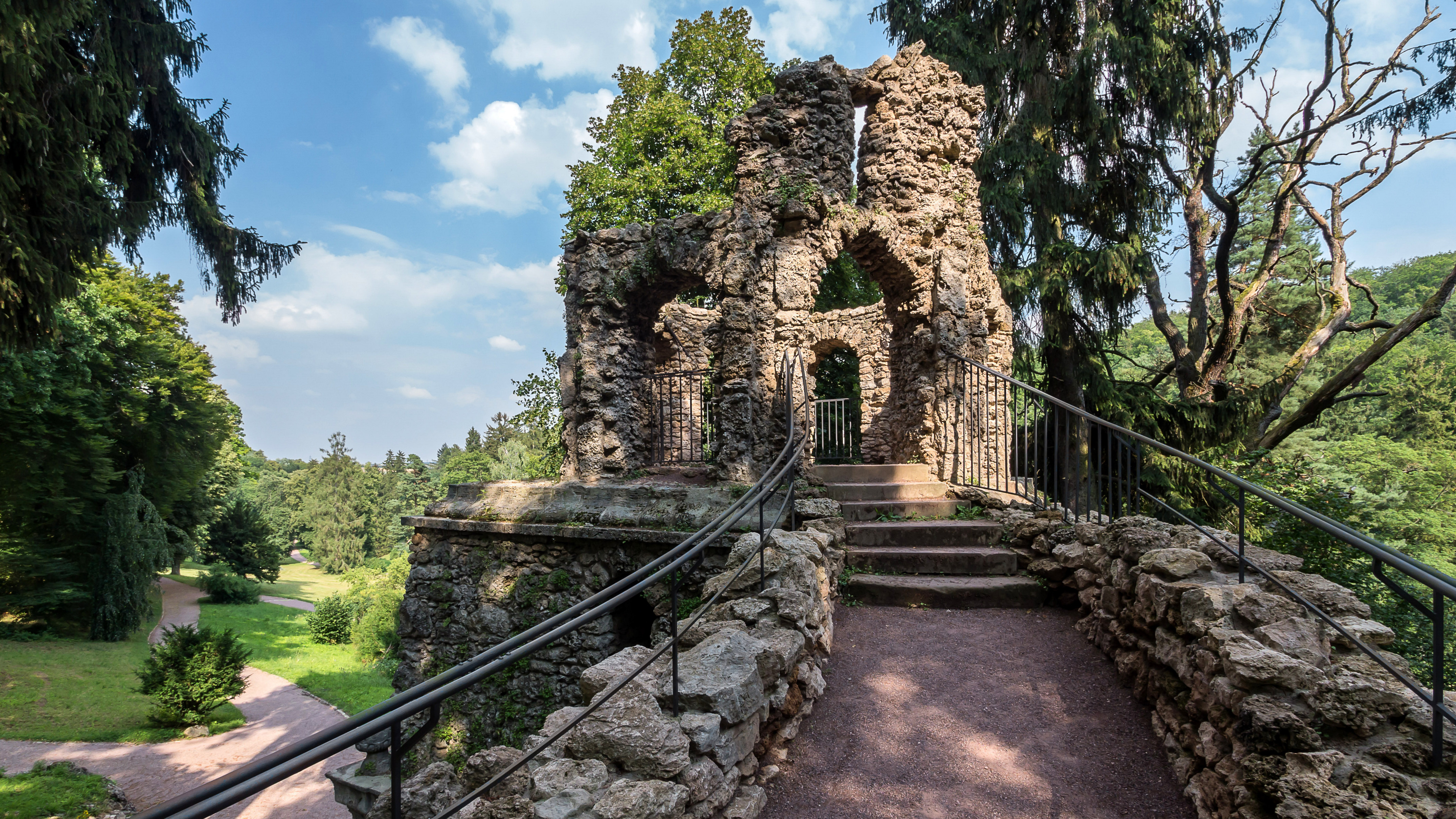 Weimar Schlosspark Belvedere Grosse Grotte